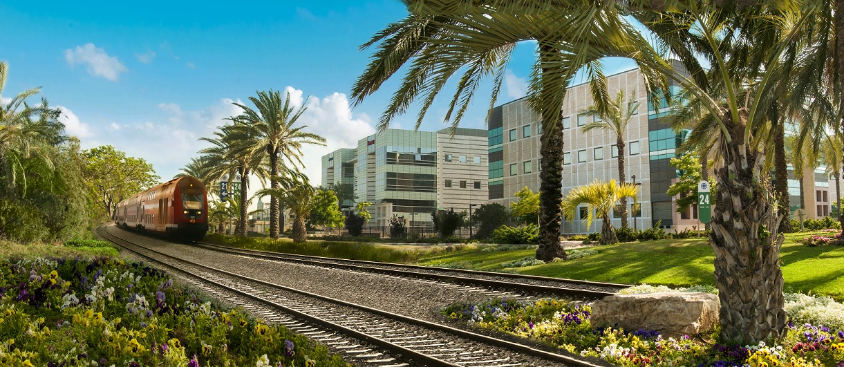 רכבת בפארק התעשייה קסריה